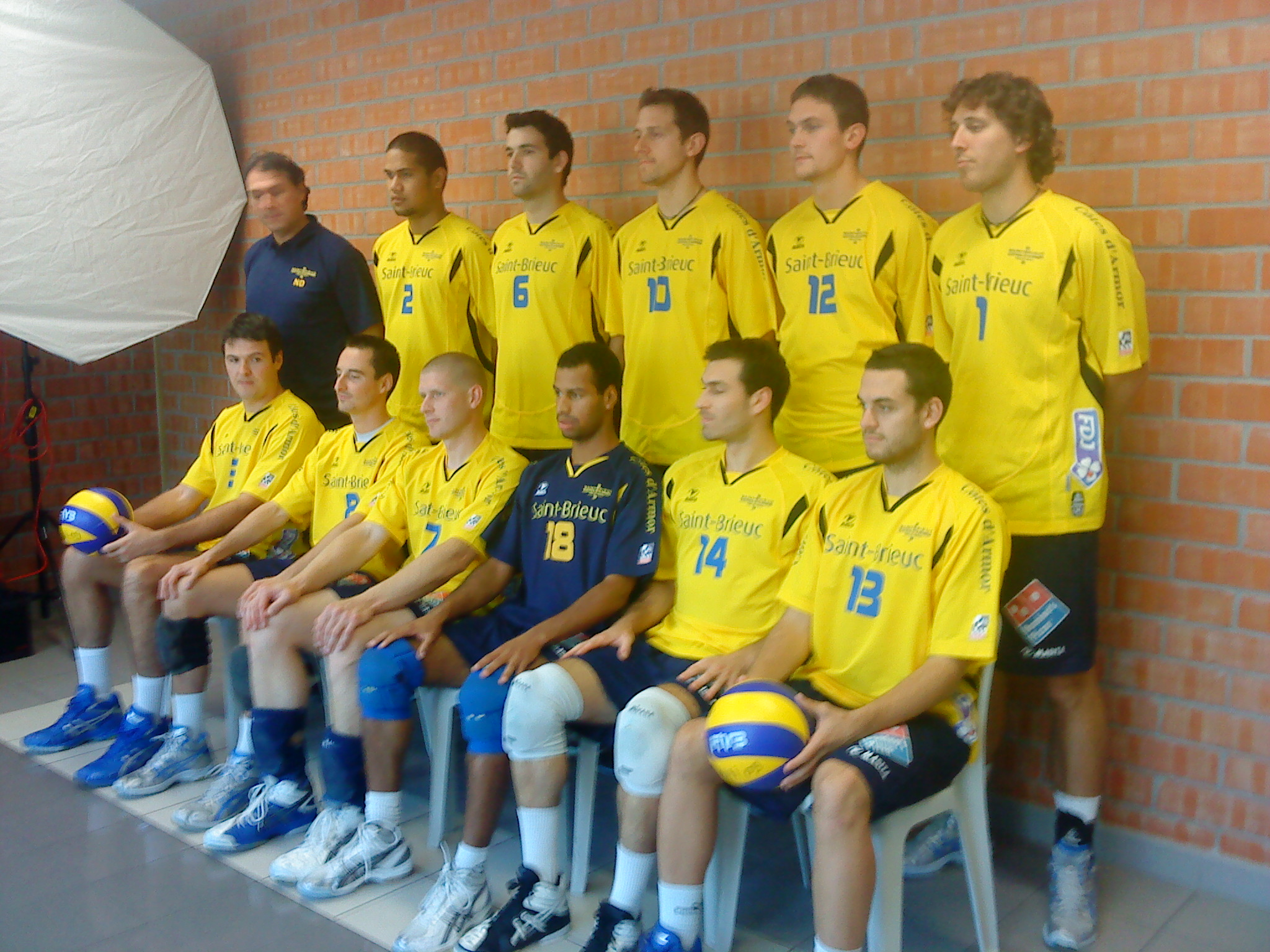 L'équipe de Saint-Brieuc Côtes-d'Armor Volley-Ball pour la saison 2010-2011